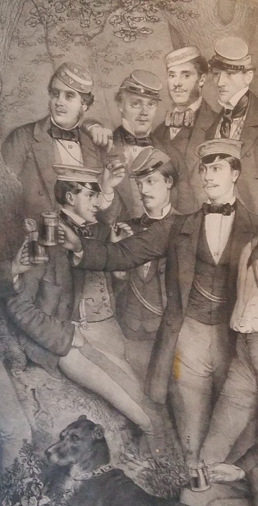 Semesterlithographie des Corps Hansea Bonn, Wintersemester 1854/55 (Ausschnitt), mit Leo von Graß-Klanin (vorne links, Nr.13)